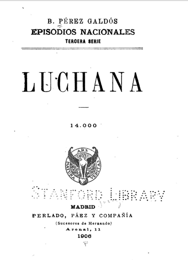 Portada de Luchana de Benito Pérez Galdós (Madrid: Perlado, Sáez y Compañía, 1906)